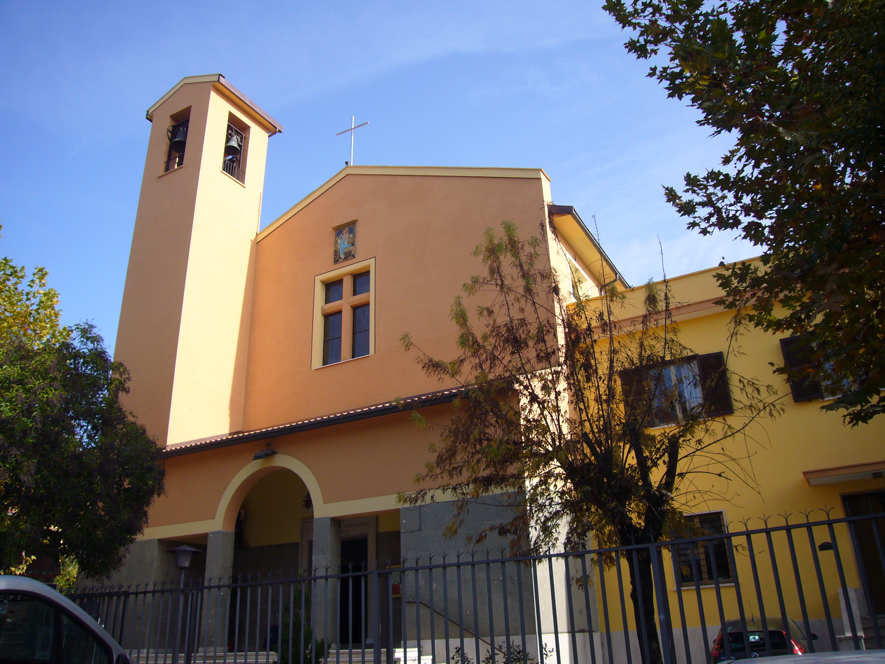 Roma, viale Alessandrino: san Giustino